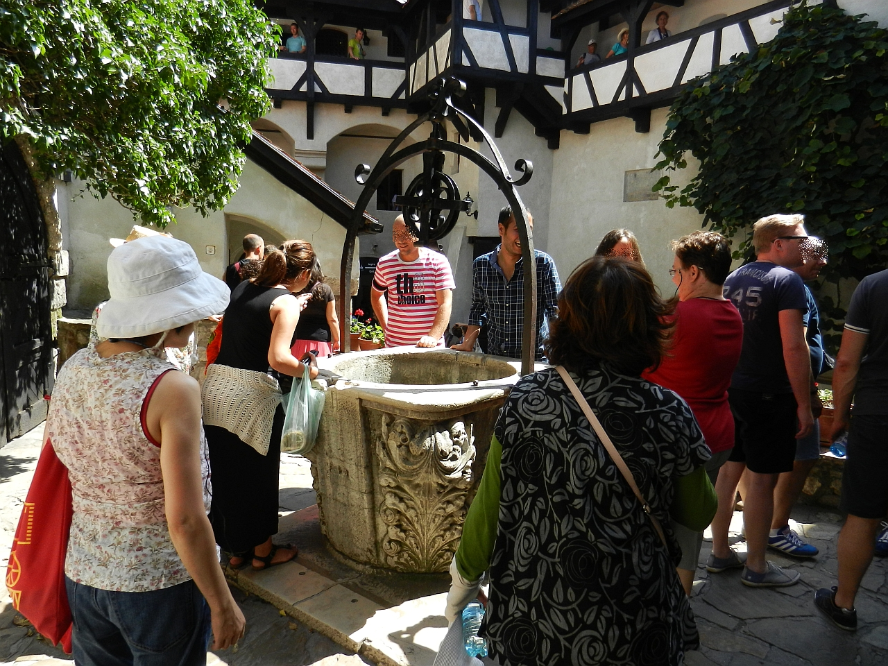 Fântâna din curtea interioara 03